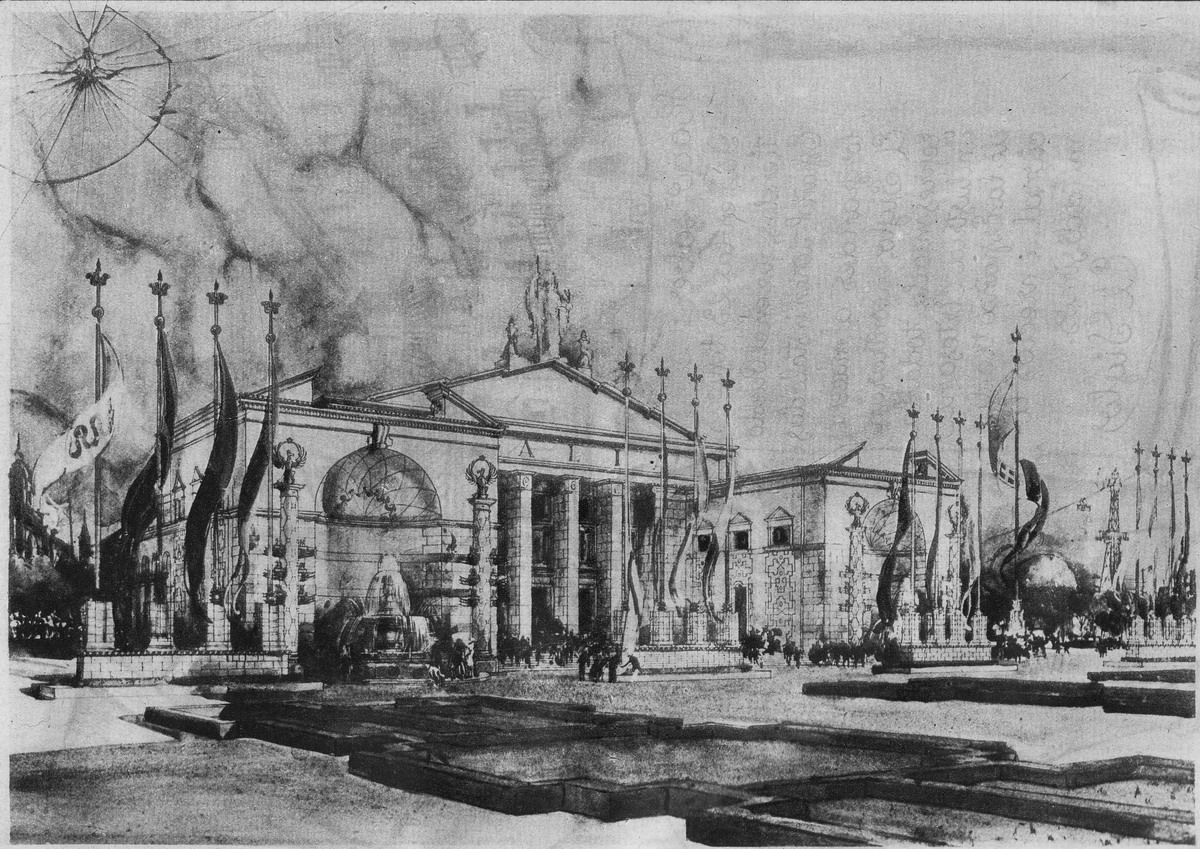 Pavelló d'Itàlia: obra de Piero Portaluppi fet el 1929 per a l'Exposició Universal de Barcelona-1929 (Catalunya).